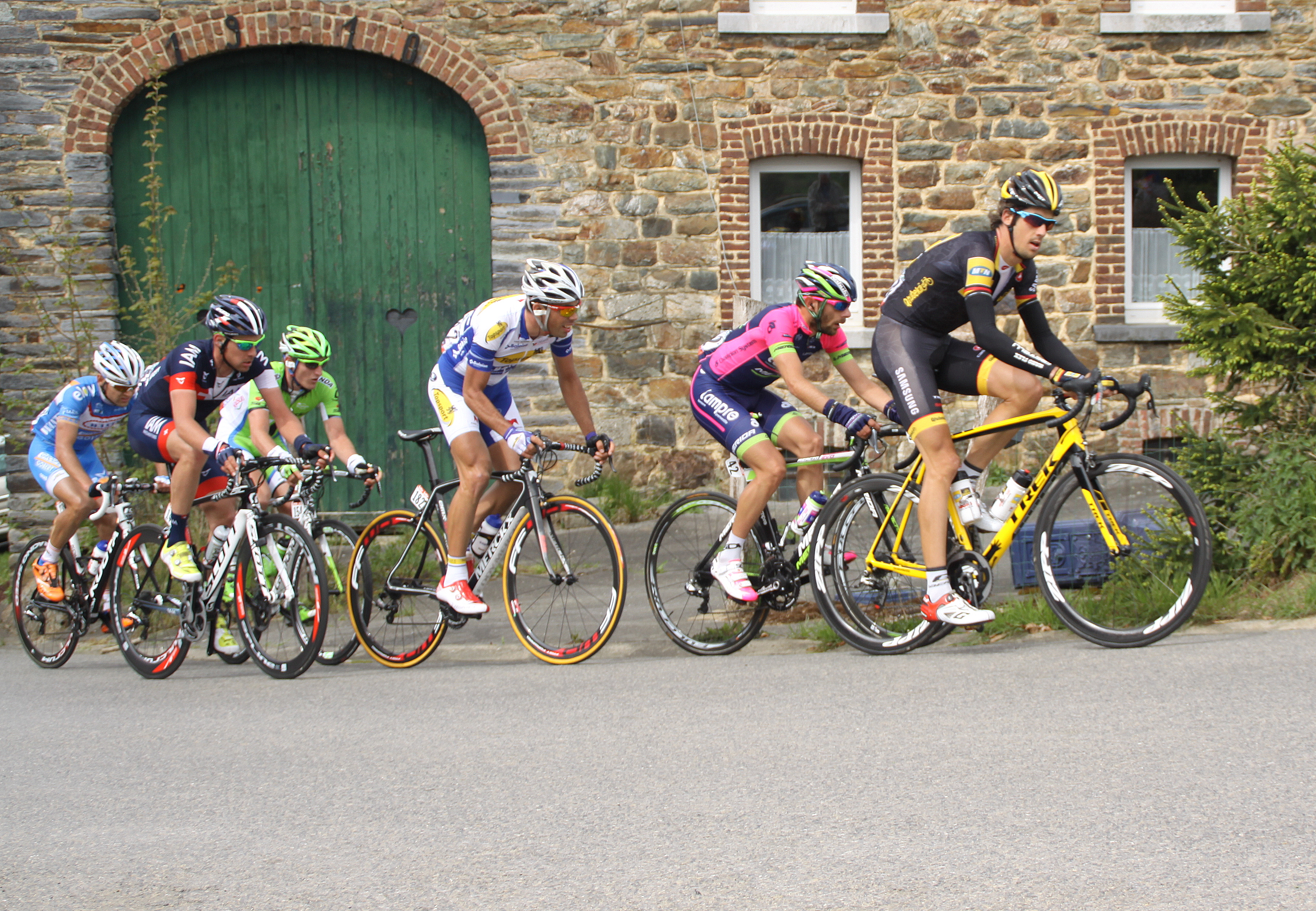 D'Echappée vum Dag an der Côte de Wanne um L-B-L 2014 Mat Pimin Lang (IAM), Michel Koch (CAN), Jacobus Venter (Mtn), Matteo Bono (LAM), Pieter Jacobs (TSV), Marco Minard (WGG)